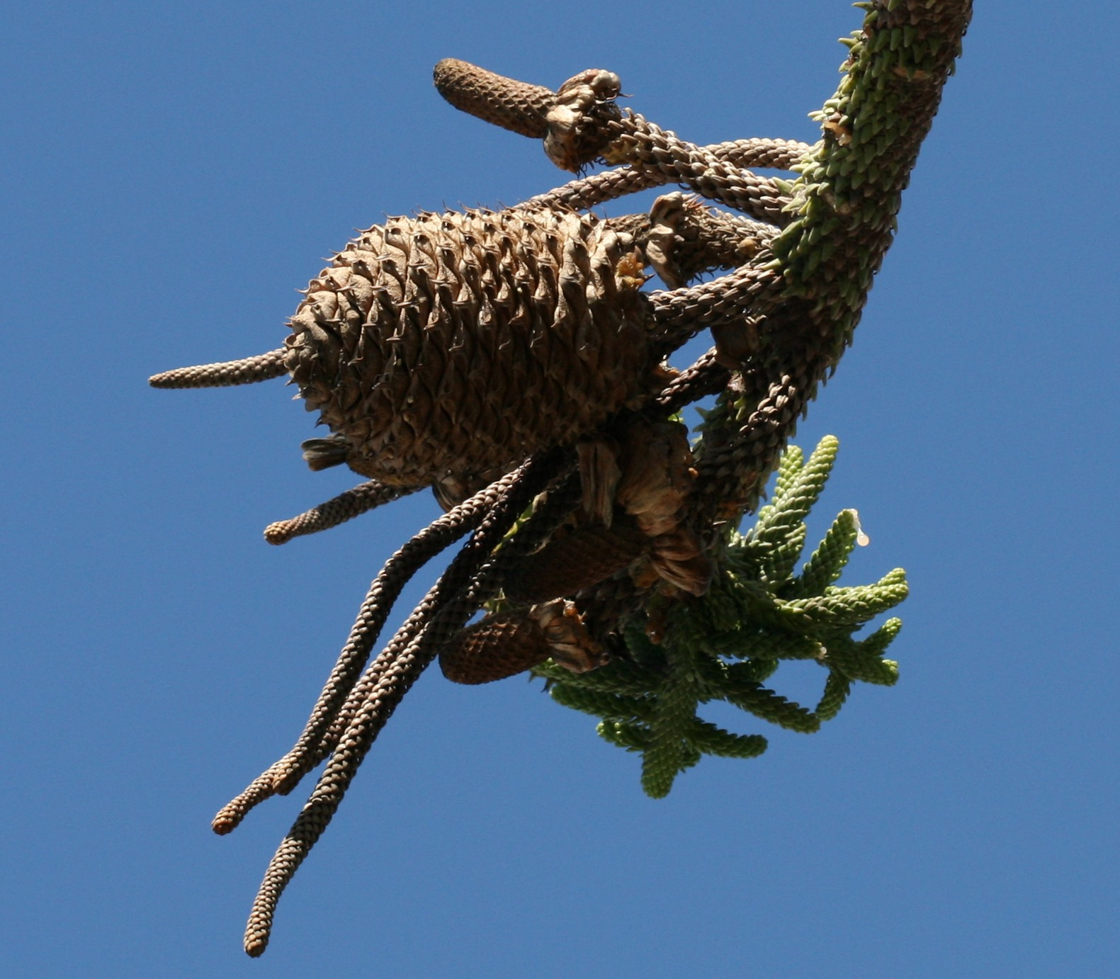 Taken in Callao Salvaje, Tenerife